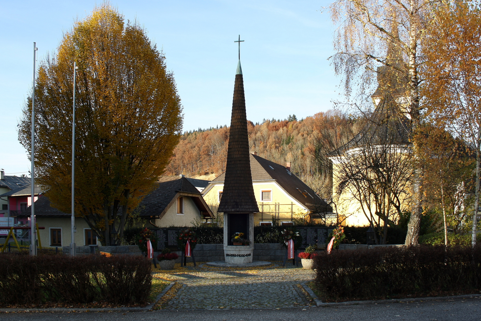 Das Soldatendenkmal in Timelkam.